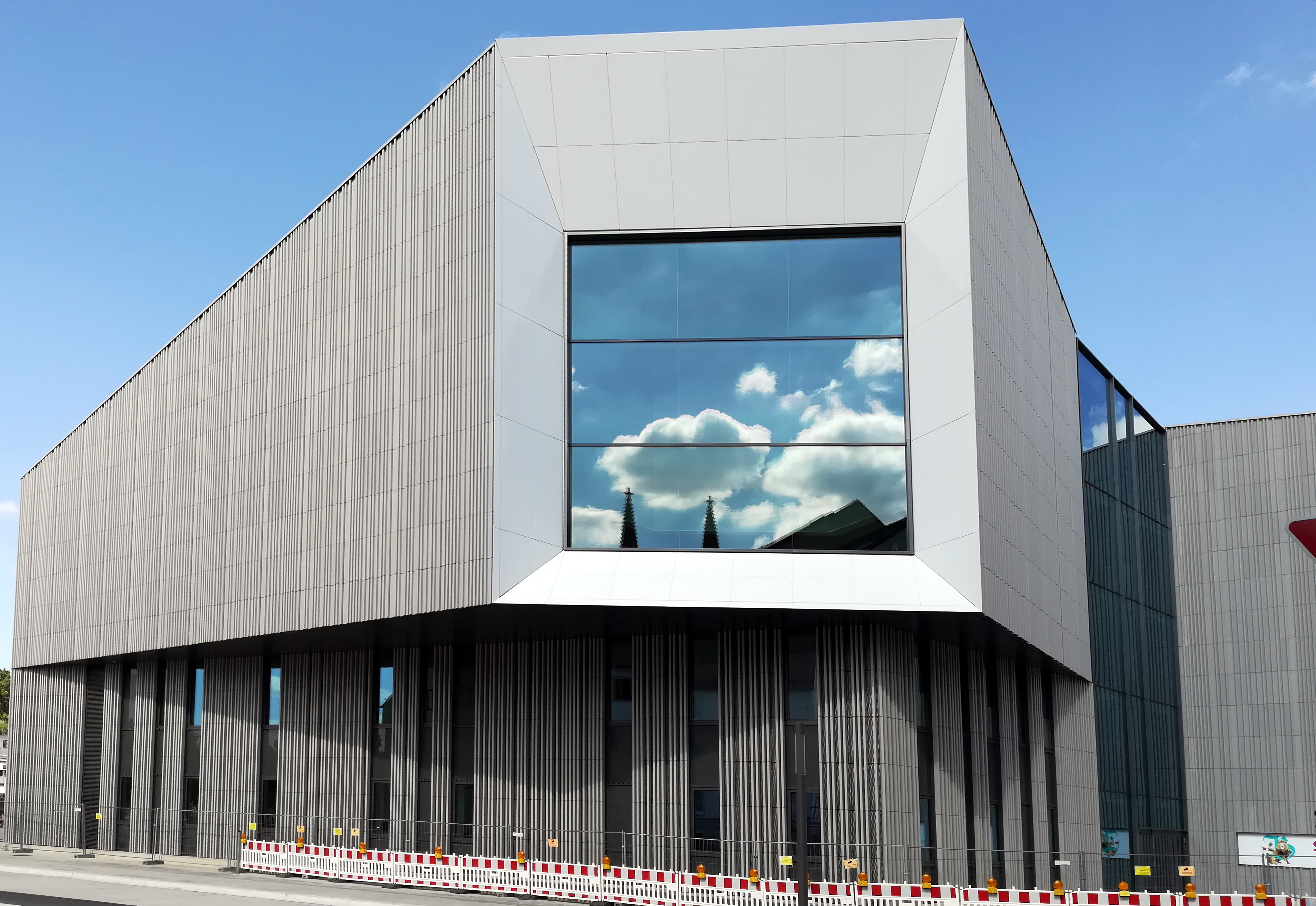 Das Museum der Bayerischen Geschichte (auch Bayerisches Landesmuseum für Geschichte oder Museum für bayerische Geschichte) ist ein entstehendes Museum zur jüngeren bayerischen Geschichte in Regensburg.